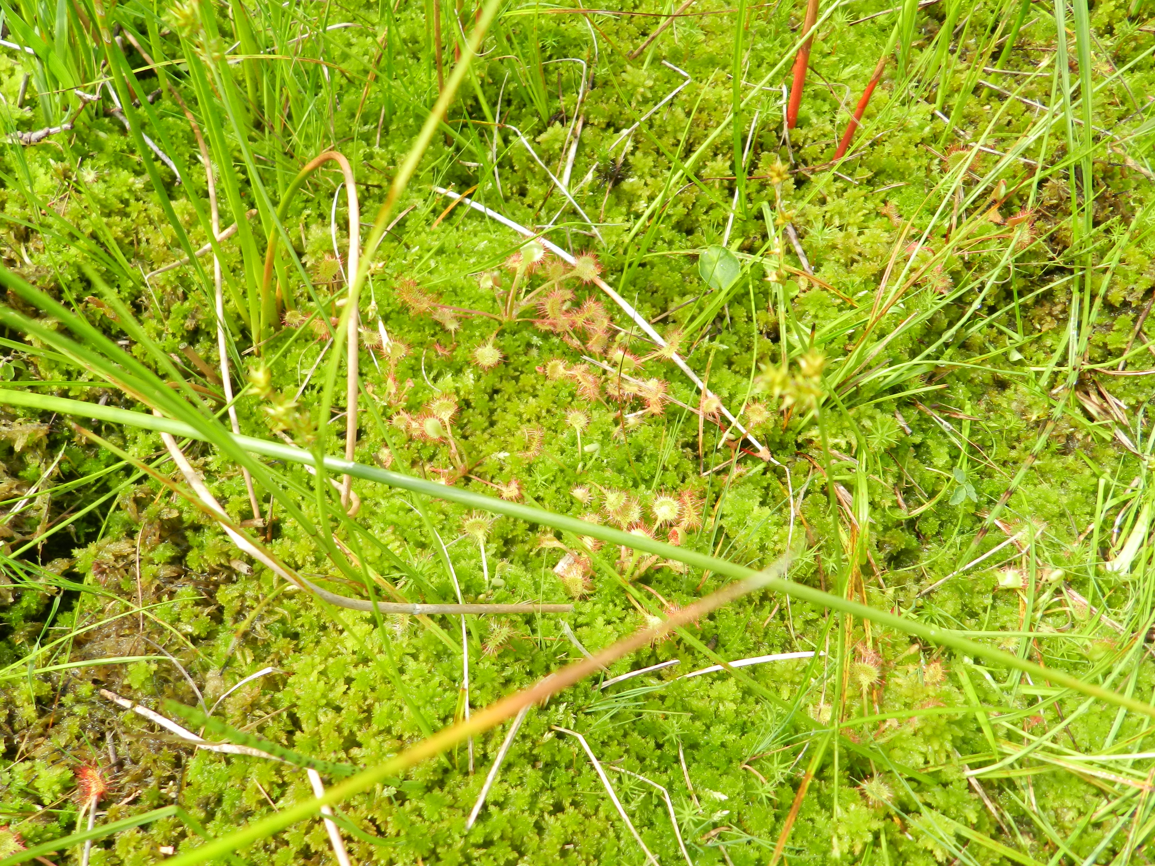 Tienhovenseplassen